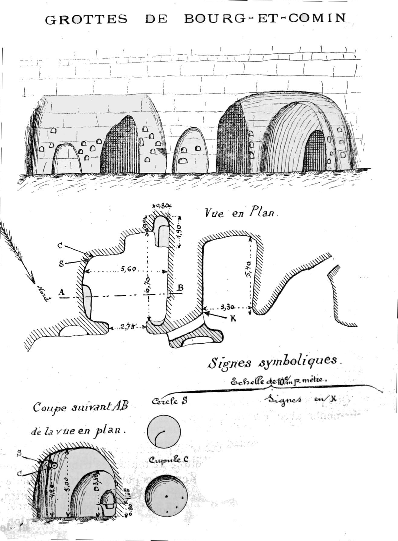 extrait du "Bulletin de la Société archéologique champenoise".